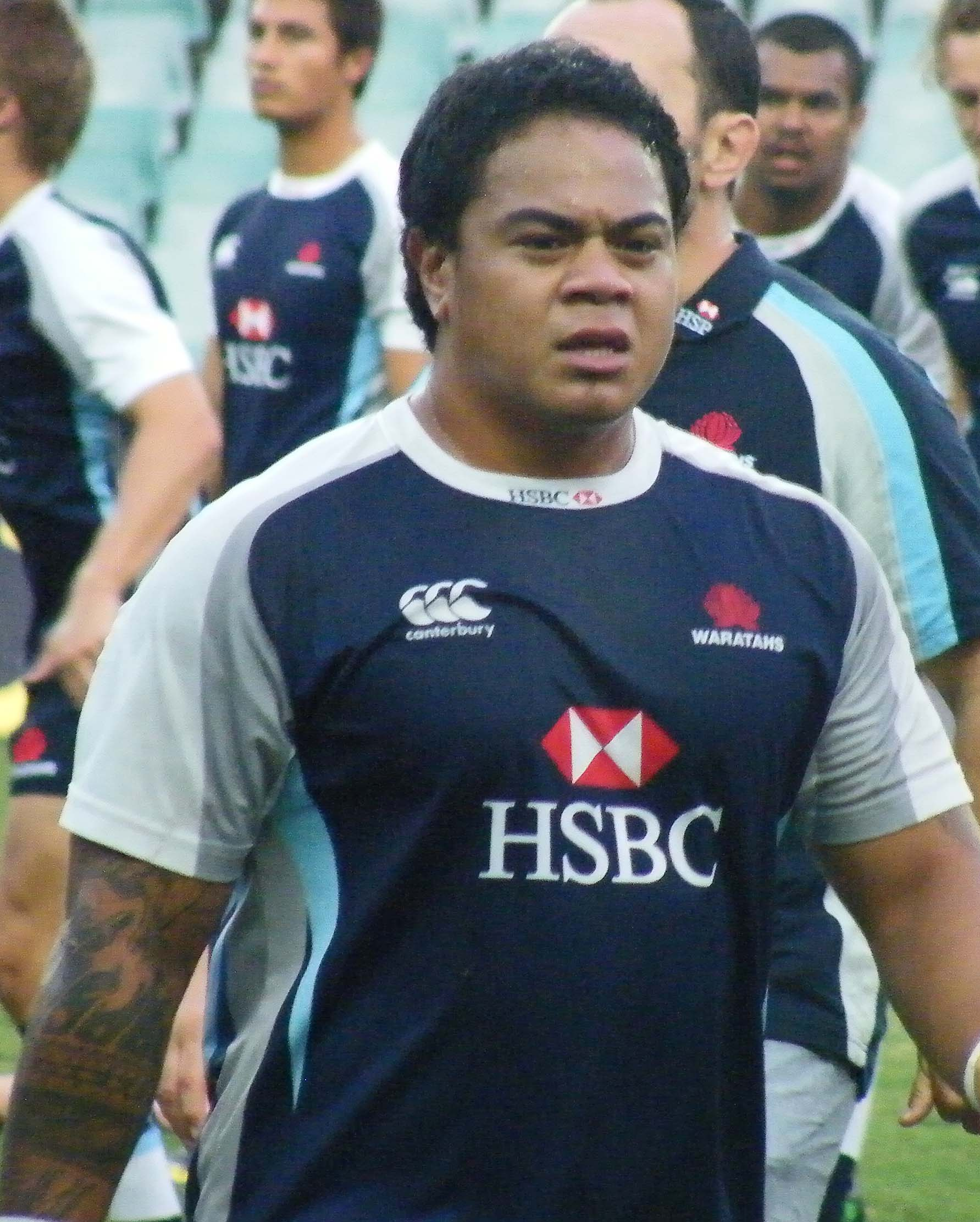 John ulugia